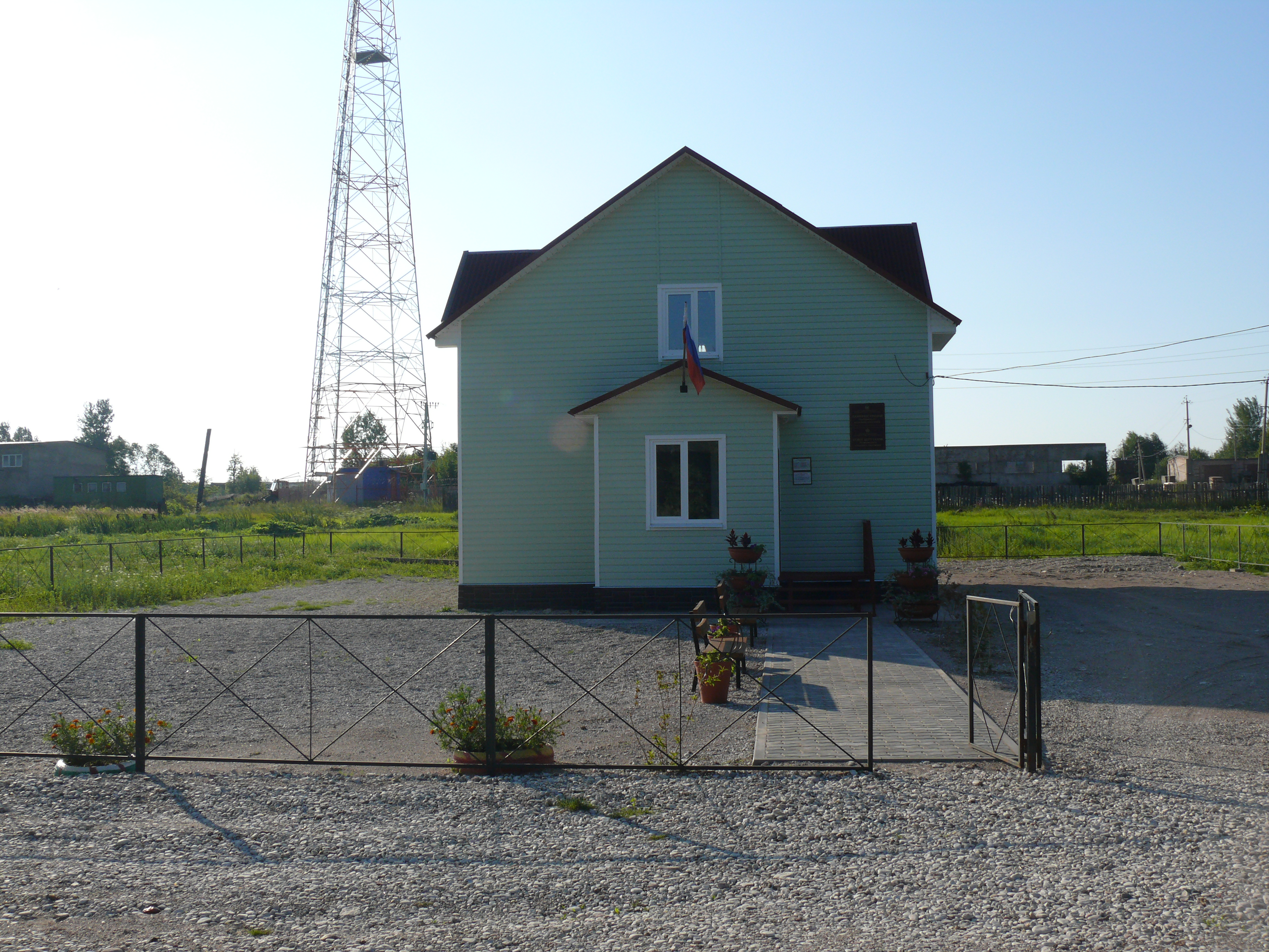 Администрация Мойкинского сельского поселения, Батецкий район Новгородской области